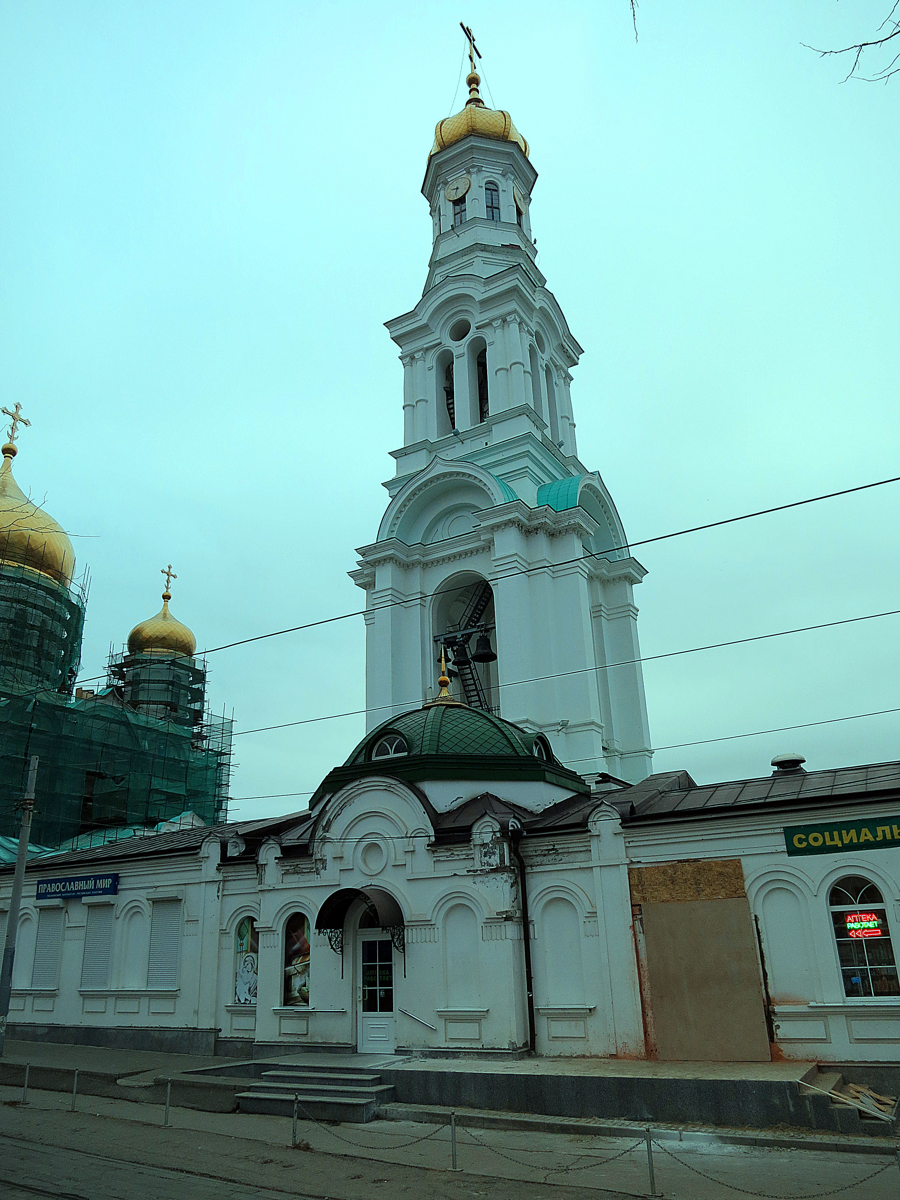 Малый храм (бывшая колокольня) (Ростовская область, Ростов-на-Дону, станиславского улица, 58)